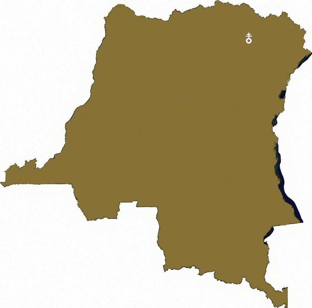 map congo